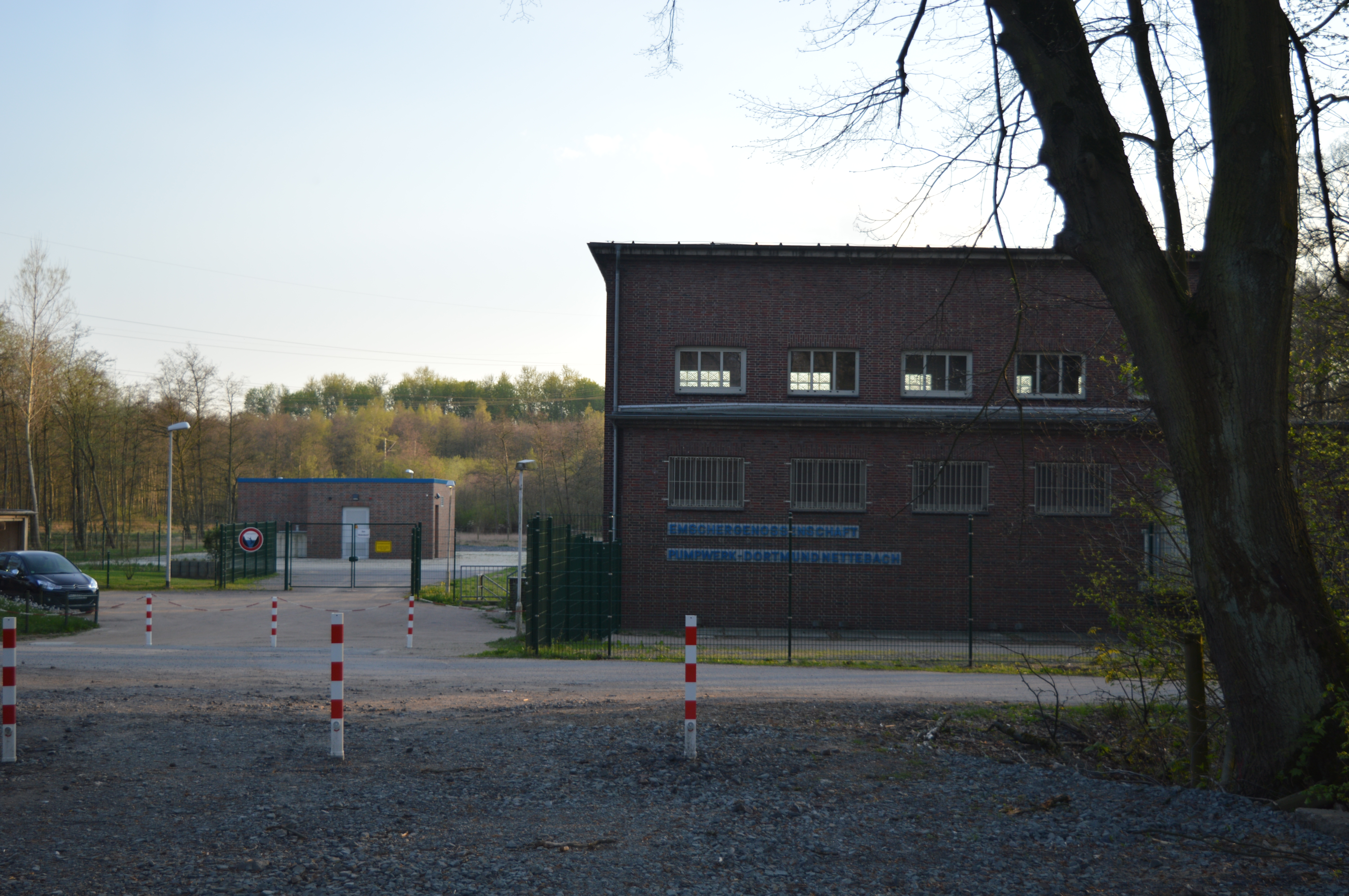 Das Pumpwerk Nettebach der Emschergenosschenschaft in Dortmund, Rahmer Wald